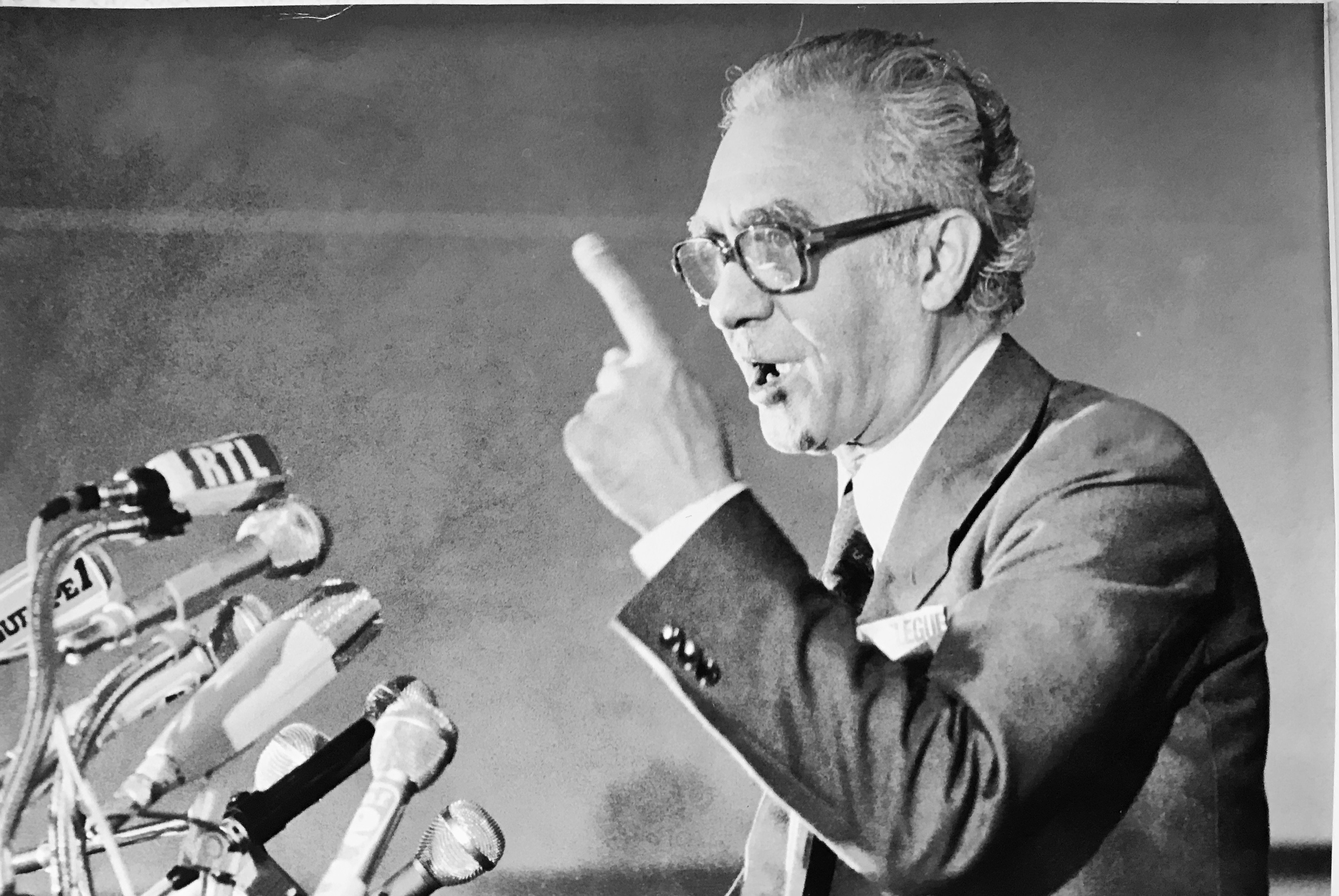 circa 1970